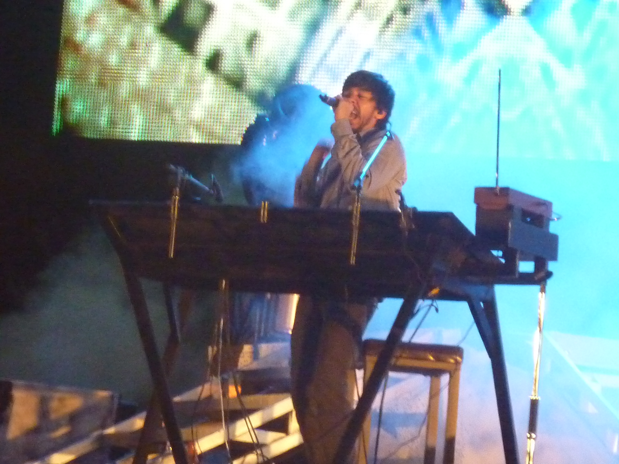 Mike Shinoda in Maquinaria Festival 2010